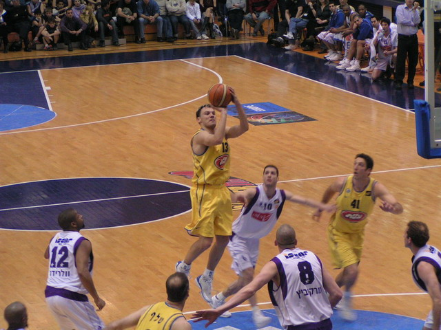 שאראס